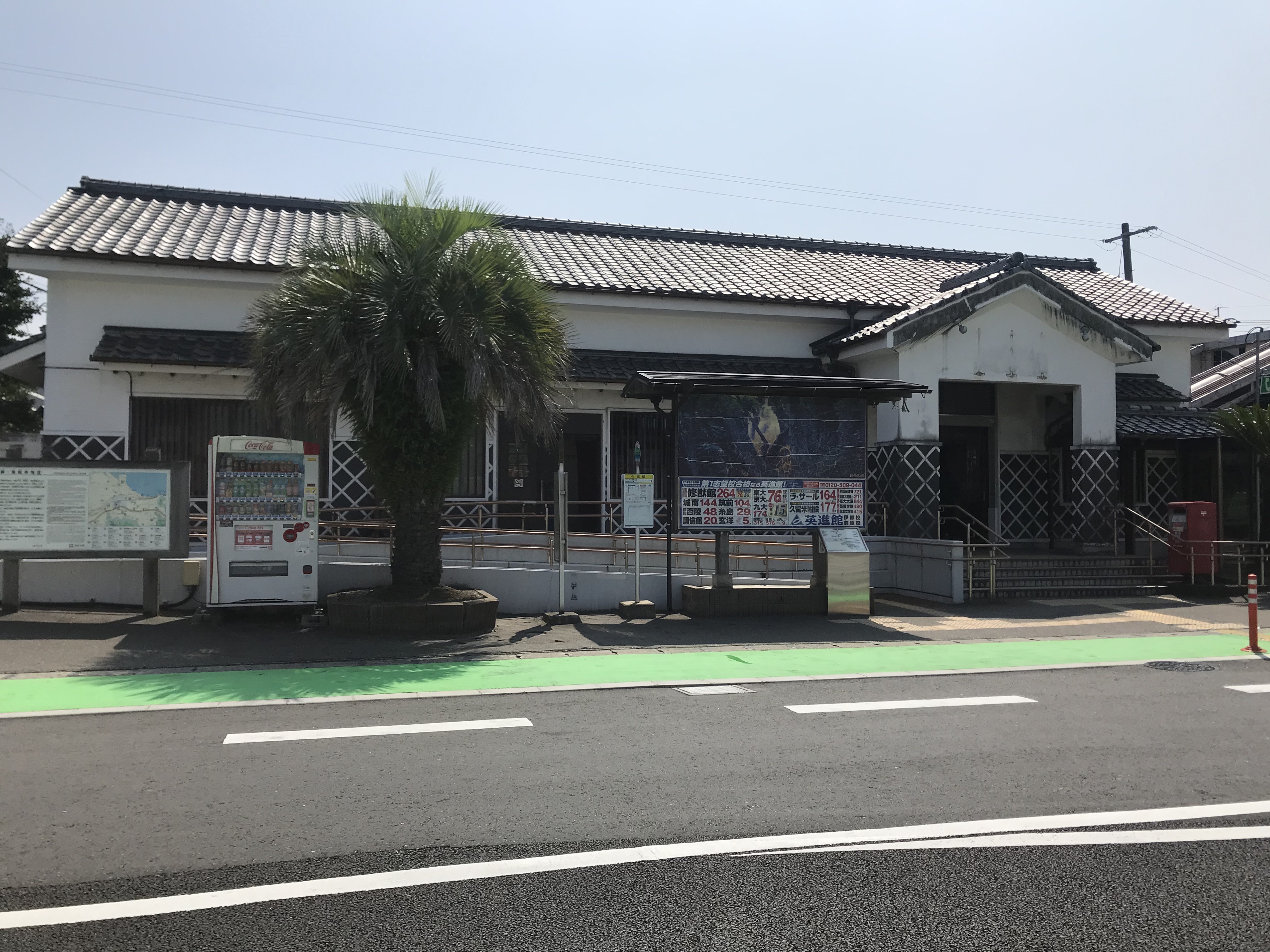 今宿駅の駅舎